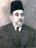 Abdelaziz Thâalbi